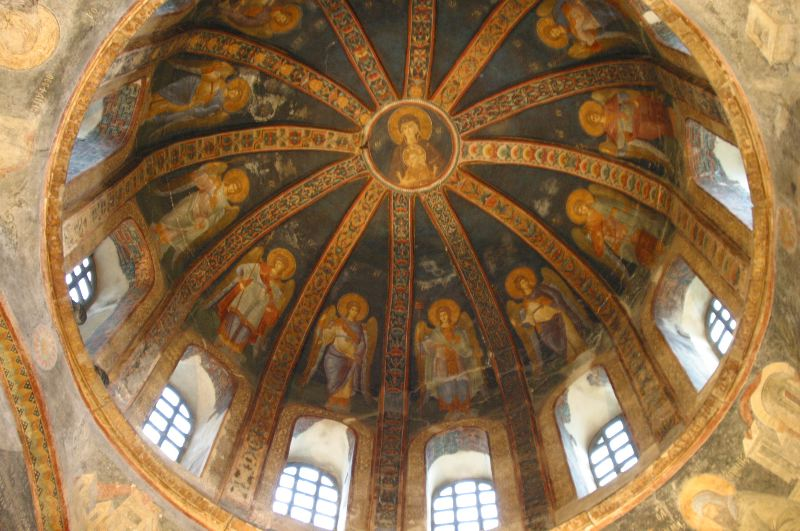 Kariye Camii, Istanbul. Kuppelen i begravelseskapellet i Chora camii.